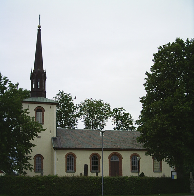 Sal kyrka i Grästorps kommun. Fotograf: Tubaist.